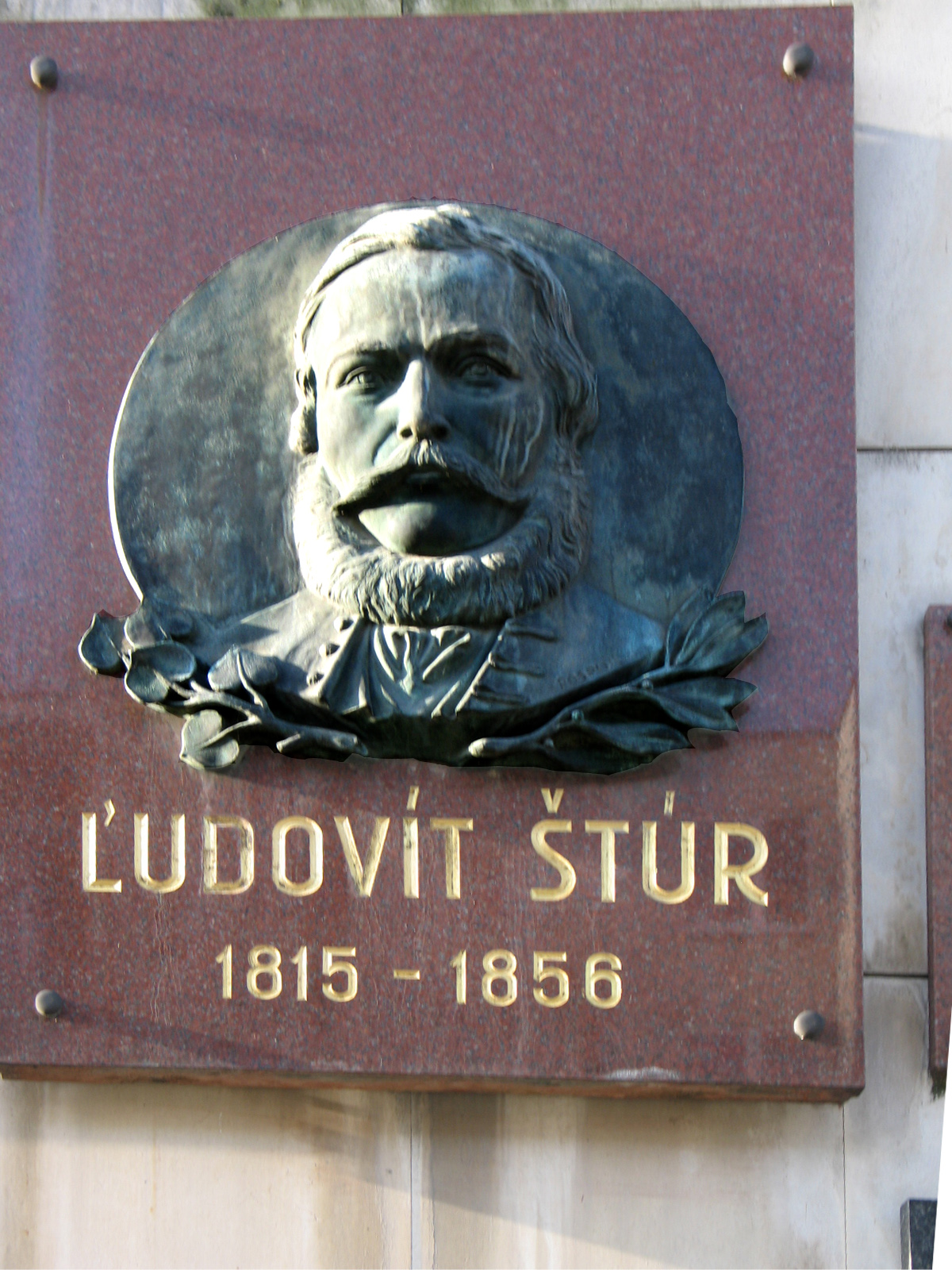 Reliéf Ľudovíta Štúra na pamätnej doske na Dome armády v Trenčíne